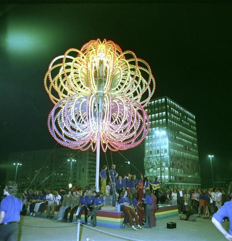 Berlin, Alexanderplatz, Festivalblume ADN-ZB/Link/2.8.73/Berlin: Festival/Unter der Festivalblume trifft sich die Jugend der Welt zu jeder Tages- und Nachtzeit. [Festivalblume am Alexanderplatz, im Hintergrund das beleuchtete Haus des Lehrers]